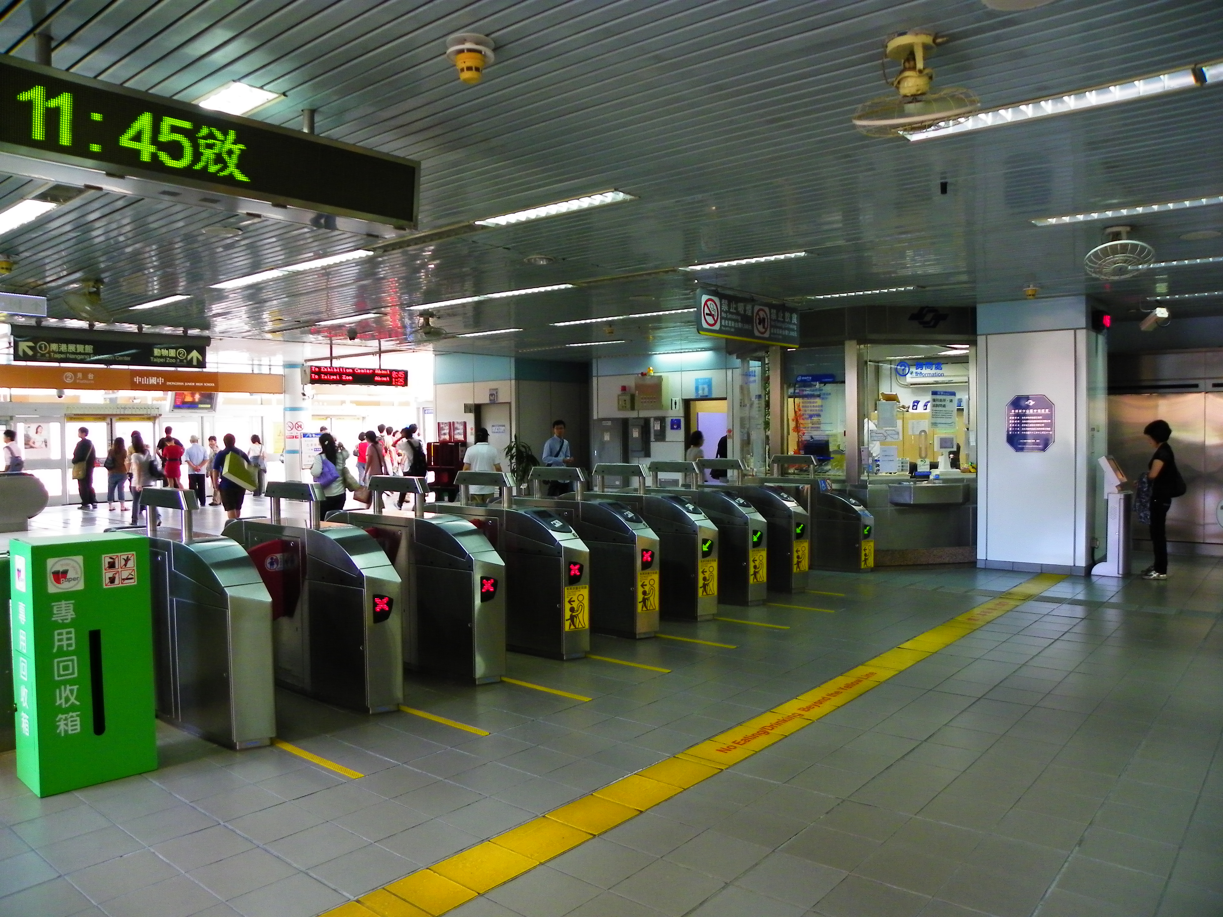 台北捷運中山国中駅改札口。